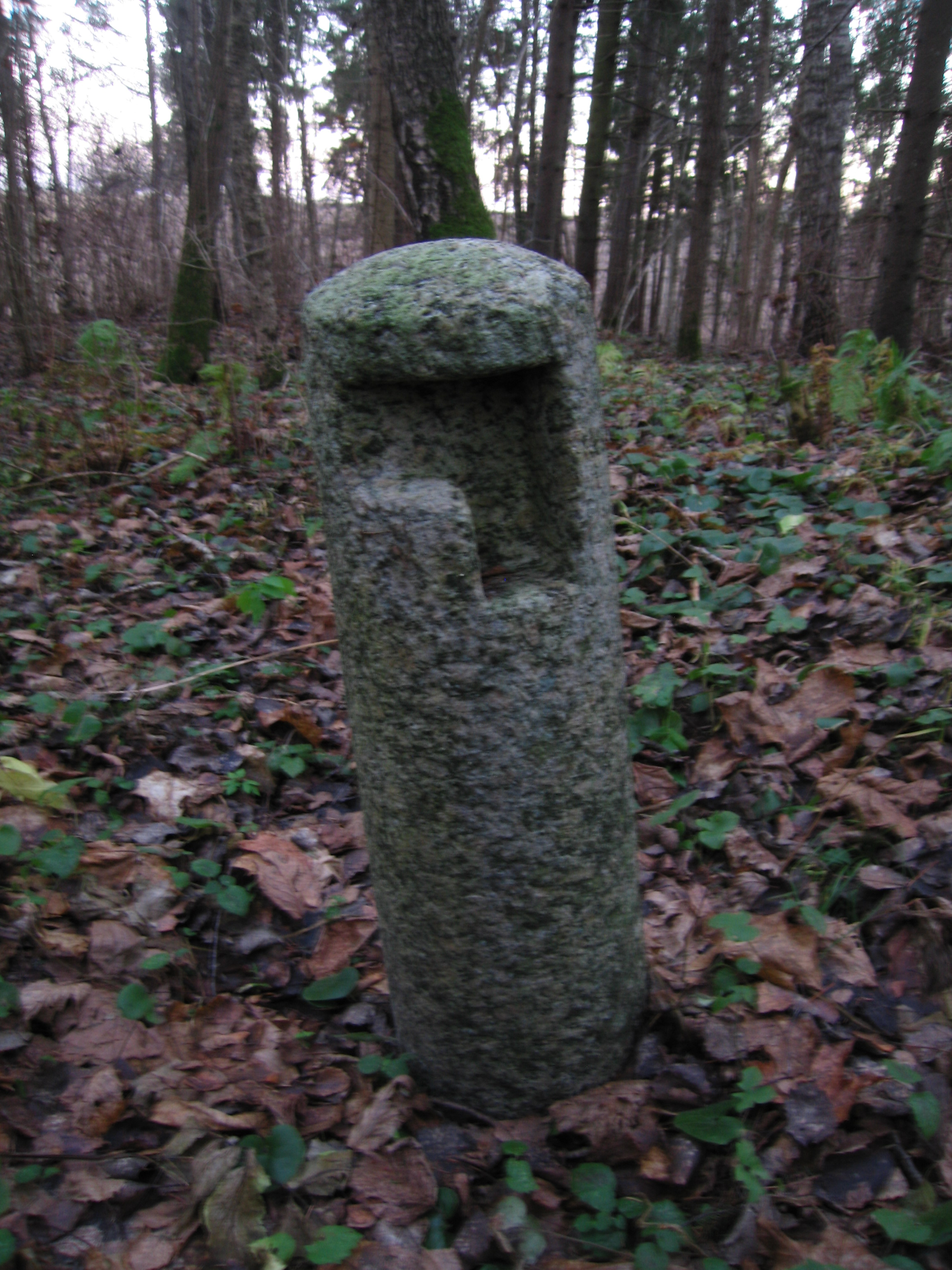 Üks kirdepoolne graniitpost, mis piiras väravana kasutatavat postivahet